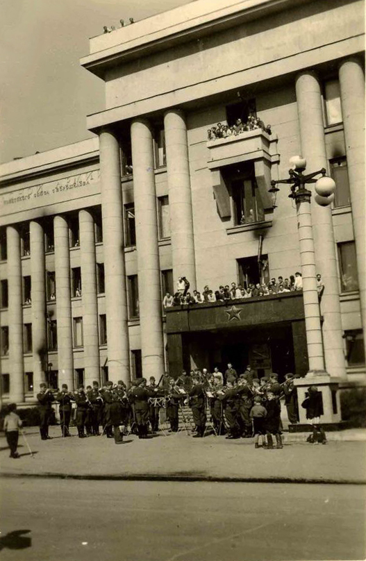 Беларуская (тарашкевіца): Менск (Miensk), вуліца Кашарская (vulica Kašarskaja). Дом афіцэраў (Dom aficeraŭ) на месцы колішняга Архірэйскага падвор'я